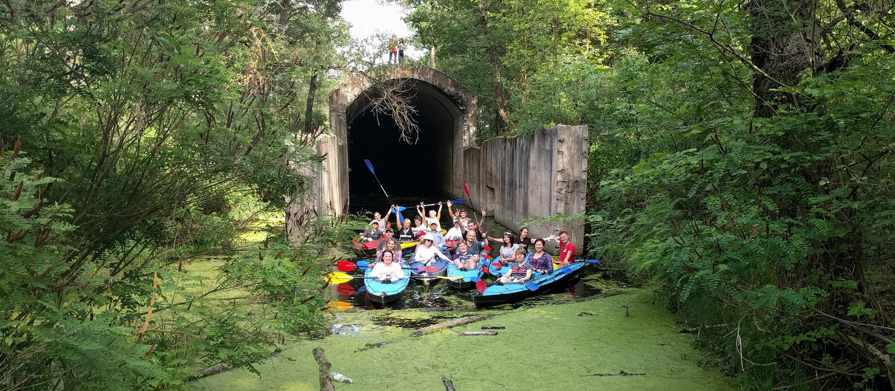 Відвудівання тонелю під Дніпром на байдарках